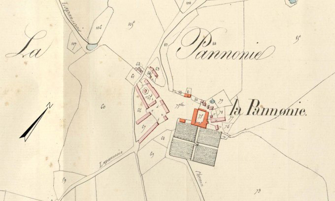 Lageplan des Schlosses La Pannonie in Couzou auf einem alten Katasterblatt